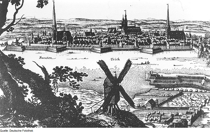 Original image description from the Deutsche Fotothek Stralsund. Stadtansicht mit Bockmühle im Vordergrund, nach Merian, um 1652, Ausschnitt